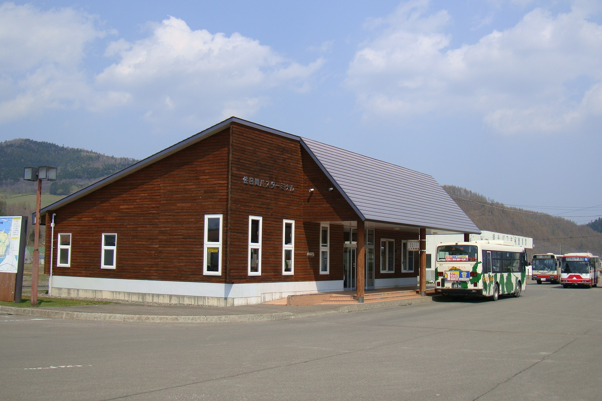 Saroma Bus Terminal